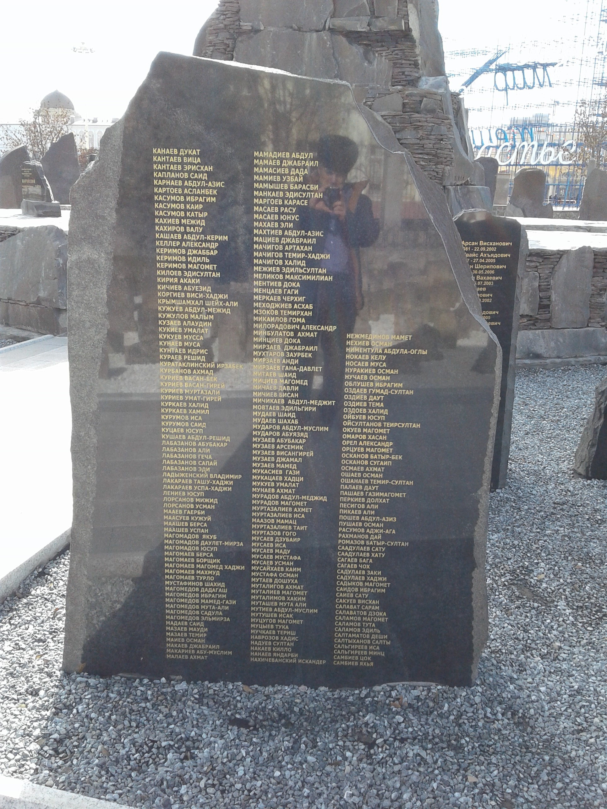 Мемориал памяти погибших в борьбе с терроризмом в Грозном